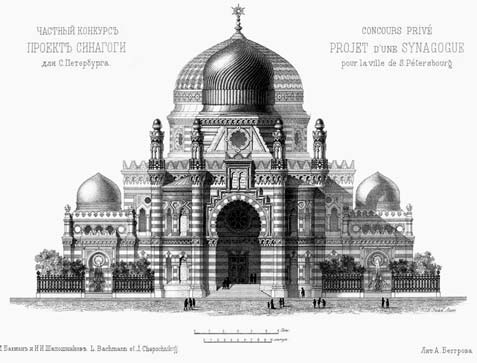 Конкурсный проект синагоги в Санкт-Петербурге. Журнал Зодчий, СПб, 1881. Табл. 7—9